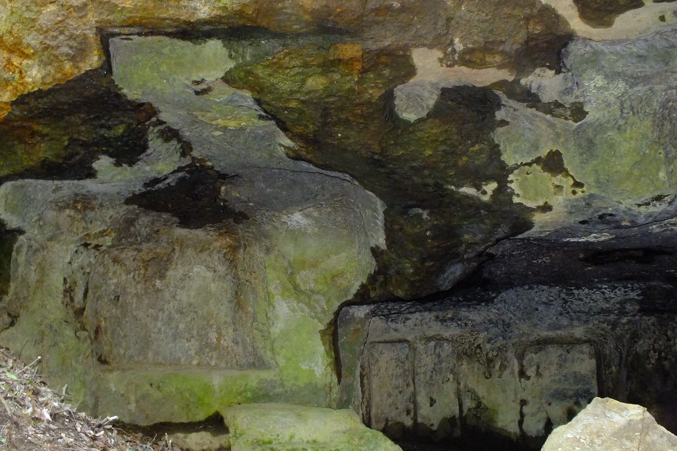 2017-04-22 Jigokudani Sekkutsubutu 地獄谷石窟仏 柳生街道